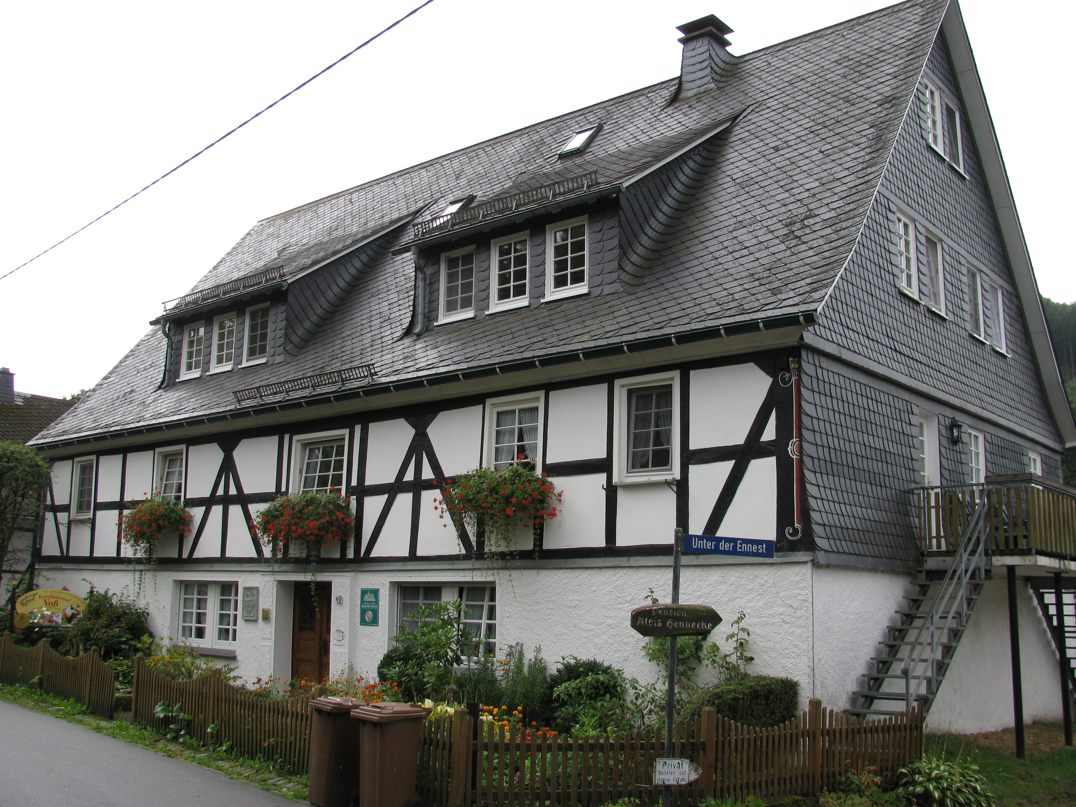 das Haus Uentropstraße 12 in Schmallenberg-LenneThis is a photograph of an architectural monument., no. 26